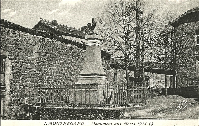 montregard 1